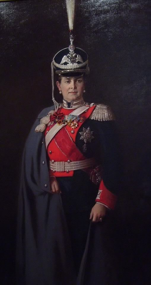 "А.М.Леонтовский. Портрет великой княгини Марии Павловны, жены великого князя Владимира Александровича" 1912 г. Холст, масло ГМЗ "Царское Село"